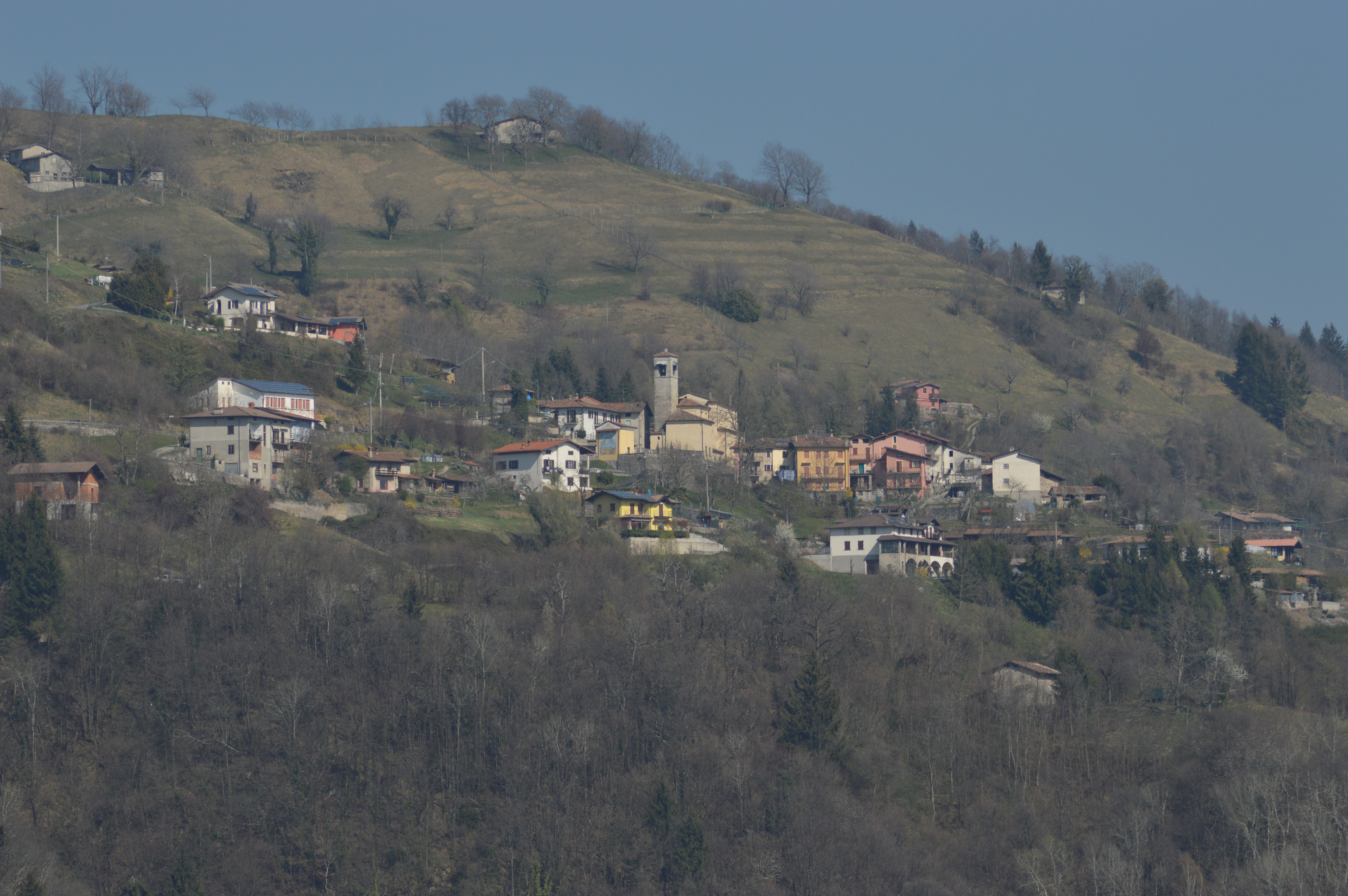 L'abitato di Belprato visto da Mura